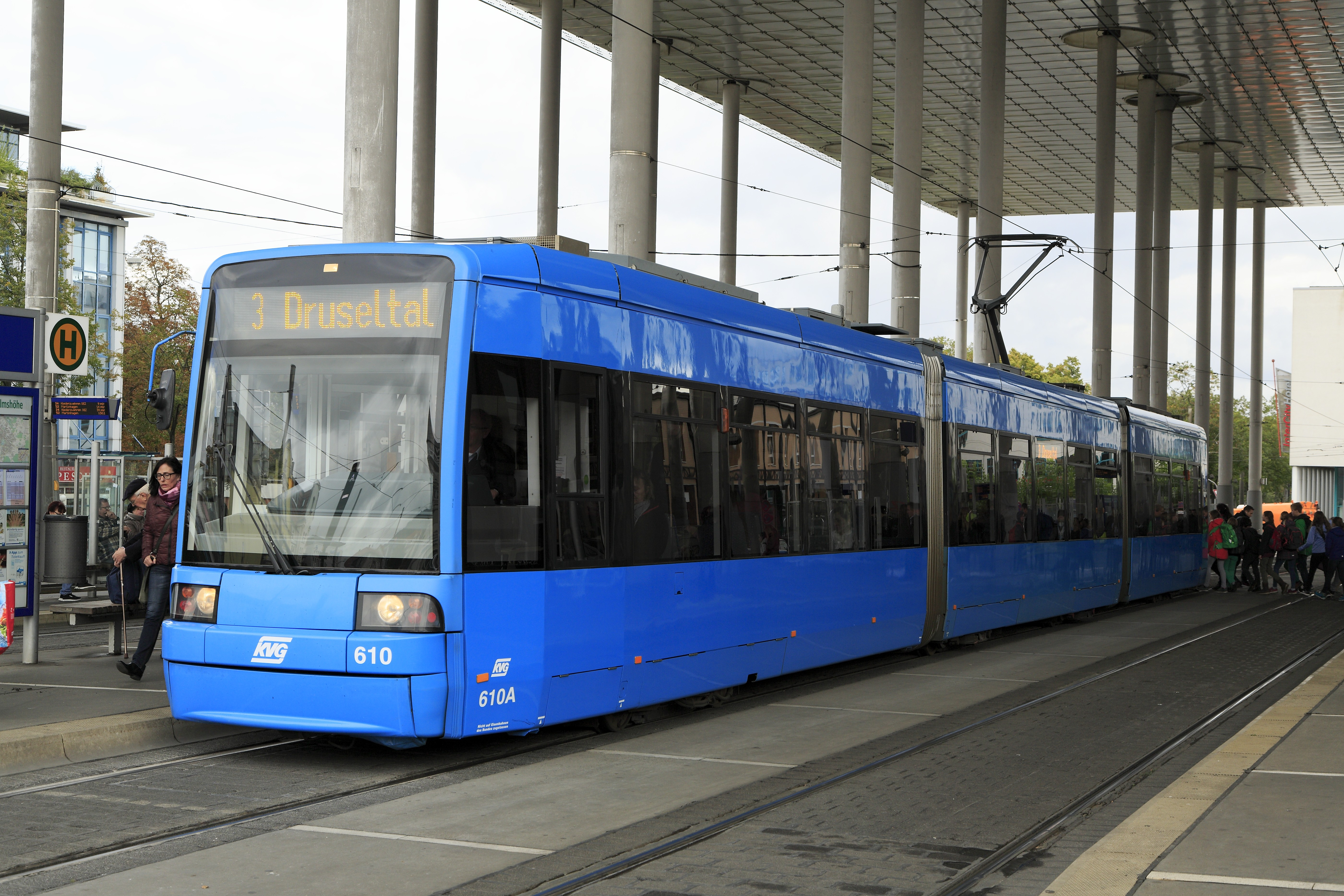 »Flexity Classic«-Einrichtungswagen, Linie 3 nach Druseltal. Alle Kasseler Flexity Classic sind wegen der besonderen Kasseler Verhältnisse EBO-zugelassen, jedoch nicht auf bundeseigenen Strecken.